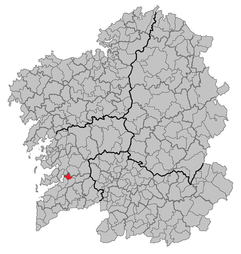 Mapa coa localización do concello de Soutomaior.